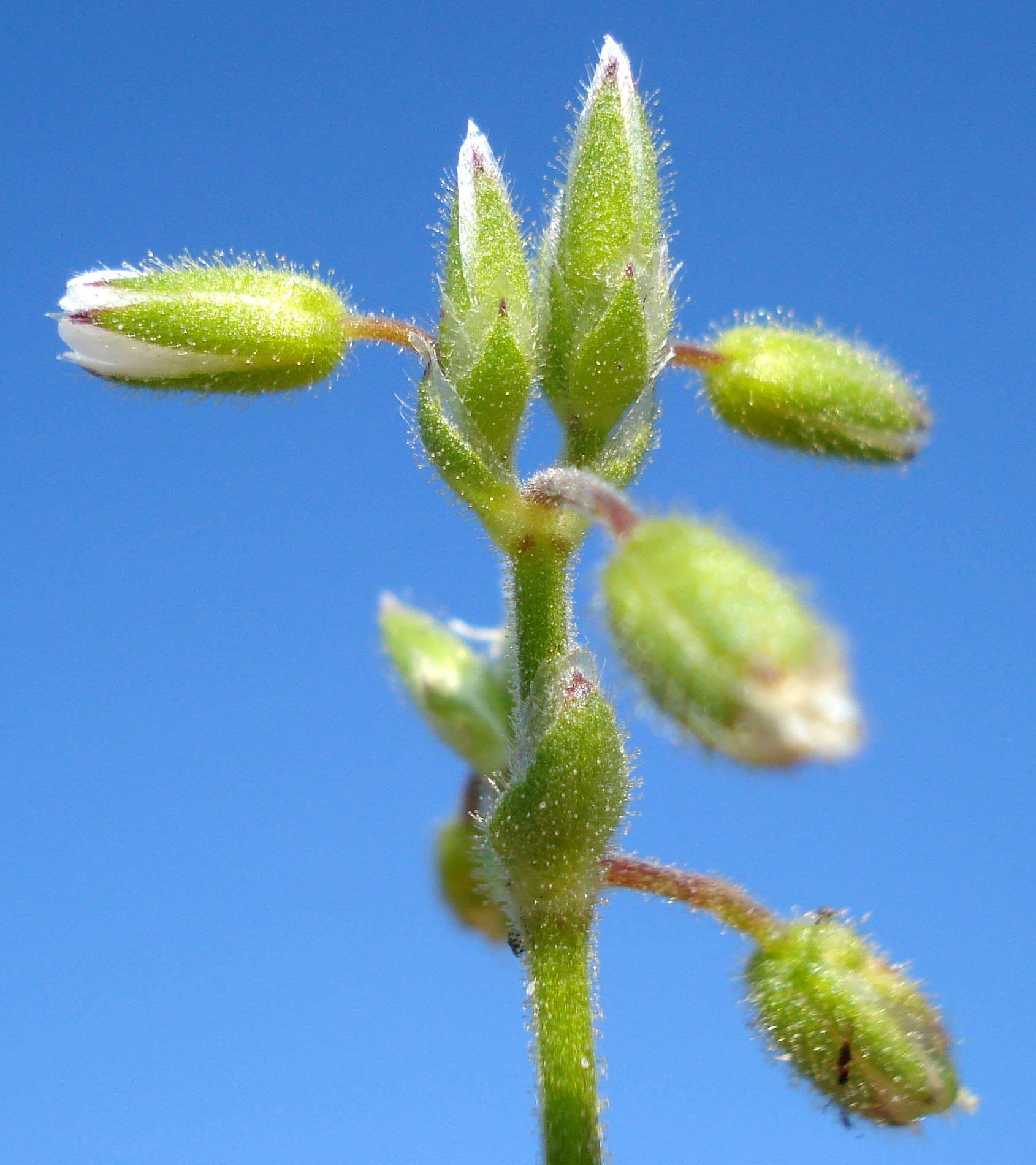 Cerastium glutinosum (Unterfranken, Germany)